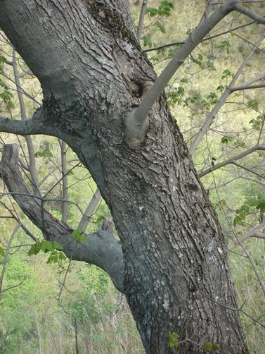 Francesco Stuppello, Tortora (CS), Tronco dell'acero d'Ungheria